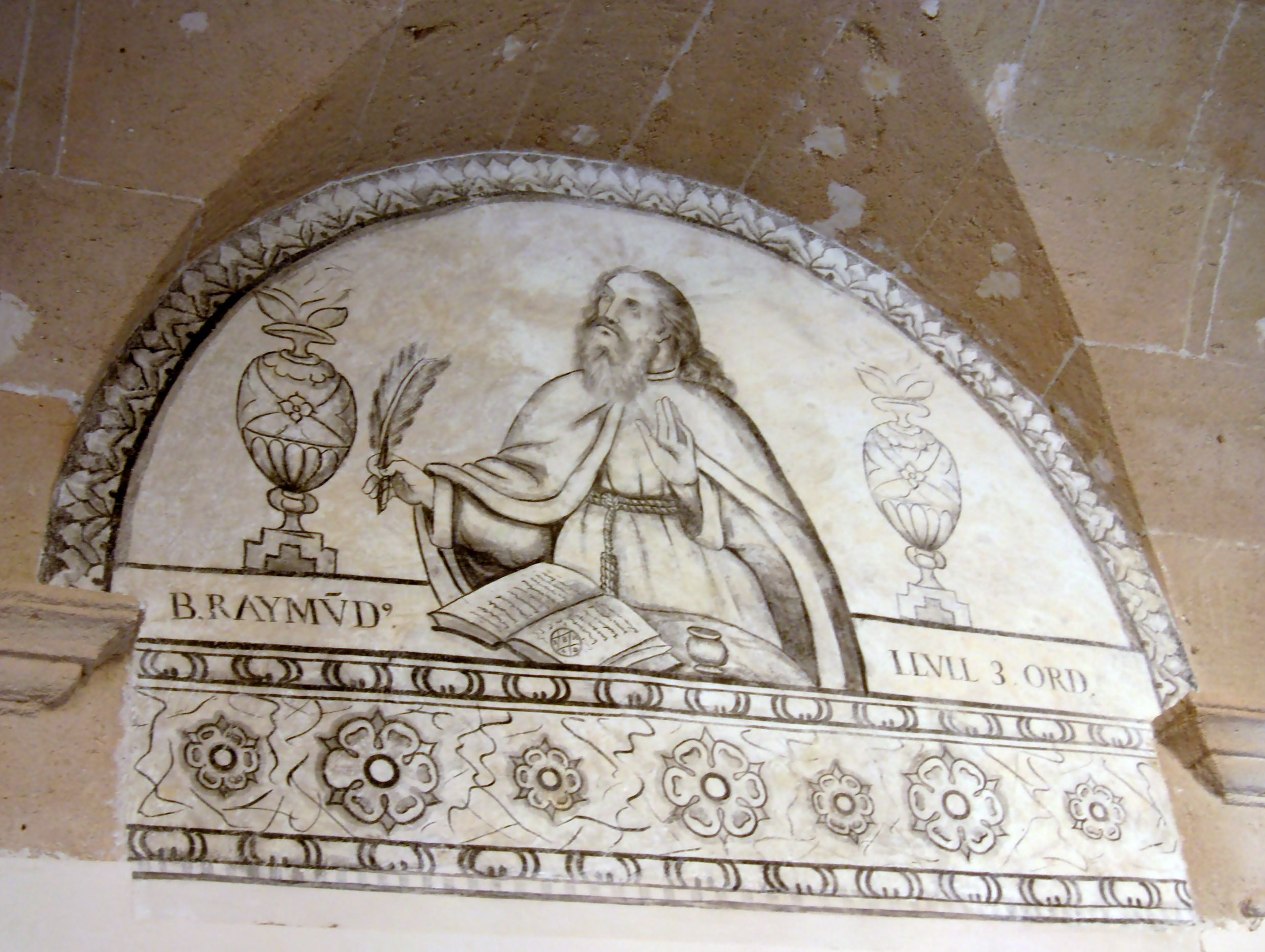 Pintura mural a una galeria del claustre de Sant Bonaventura de Llucmajor, Mallorca, que representa a Ramon Llull.